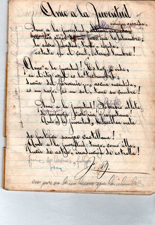 Manuscrito del poema Amo la Juventud